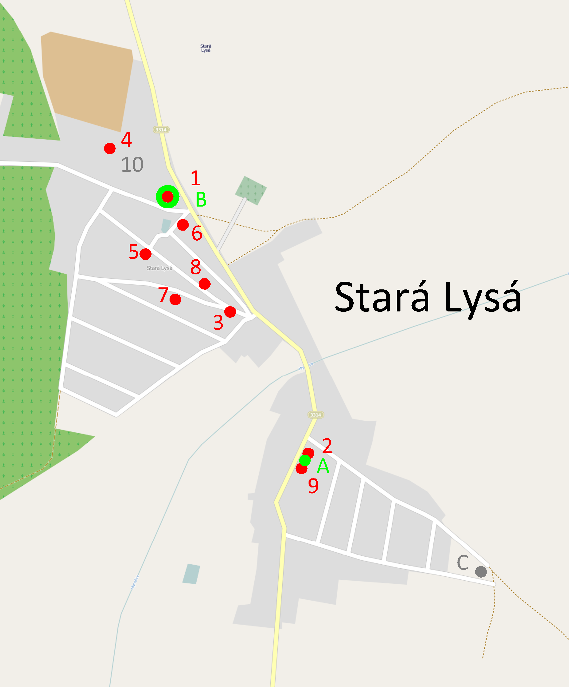 Stará Lysá, stavebí a přírodní památky. 1. kaple sv. Jana Křtitele; 2. krucifix; 3. zvonička; 4. hospodářský dvůr Alžbětín; 5 dům čp. 100 s výminkem; 6. dům čp. 20; 7. dům čp. 41 s hospodářskými budovami; 8. dům čp. 34 s hospodářskými budovami; 9. pomník padlým v 1. světové válce; 10. socha sv. Isidora; A. tisíciletá lípa na návsi; B. šest lip malolistých; C. borovice lesní (vyvrácen 1997) This map of Stará Lysá was created from OpenStreetMap project data, collected by the community. This map may be incomplete, and may contain errors. Don't rely solely on it for navigation.